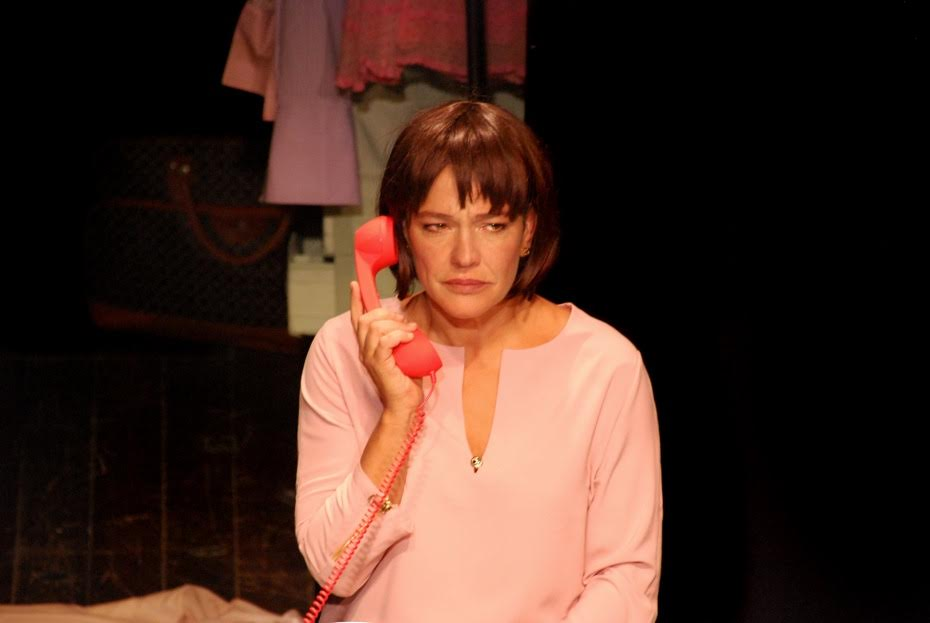 מירב גרובר בהצגה נבגדת מאת ובבימויה של עדי יפת פוקס